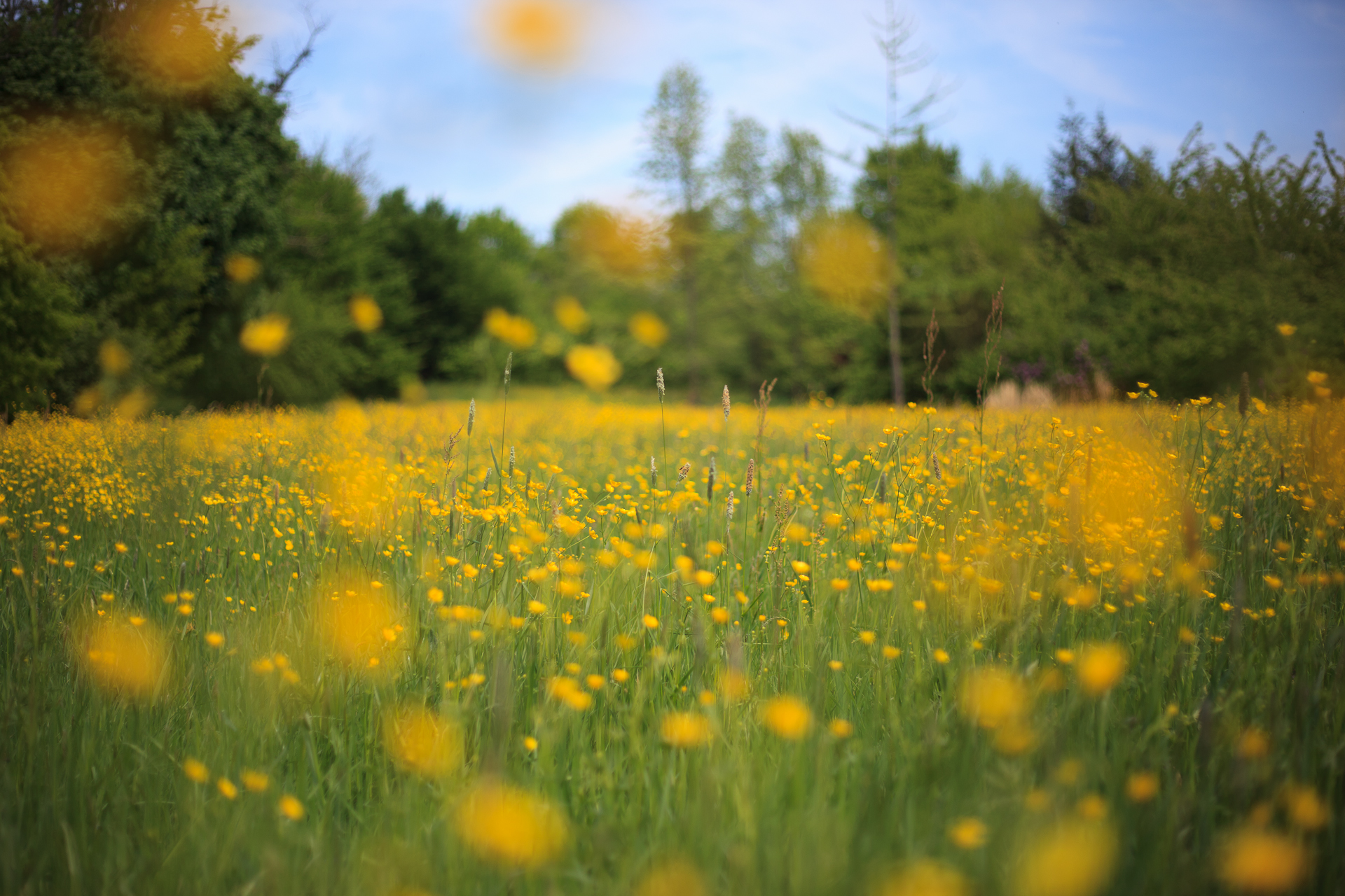 Buttercup Rain